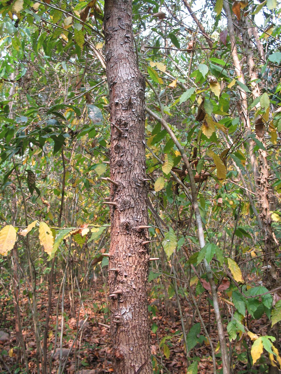 Cratoxylum formosum le tronc épineux en forêt sèche Laos